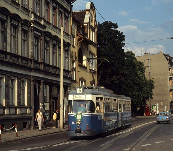 Tramwaj 4EGTW w Gorzowie Wlkp.